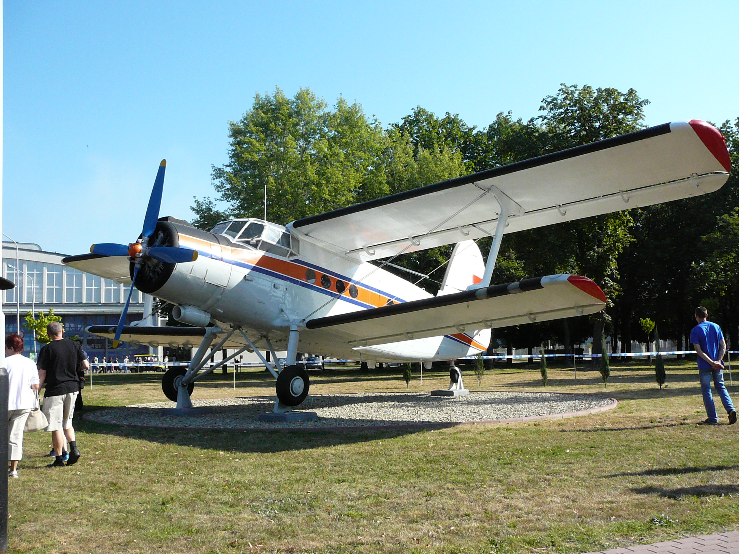 Samolot-pomnik An-2 na terenie PZL Mielec, 2013